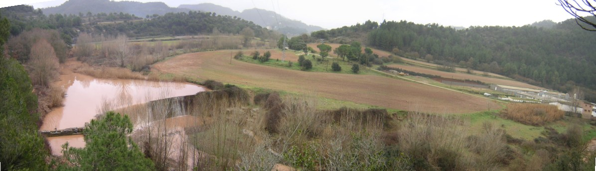 Els Campassos (Monistrol de Calders, Moianès)